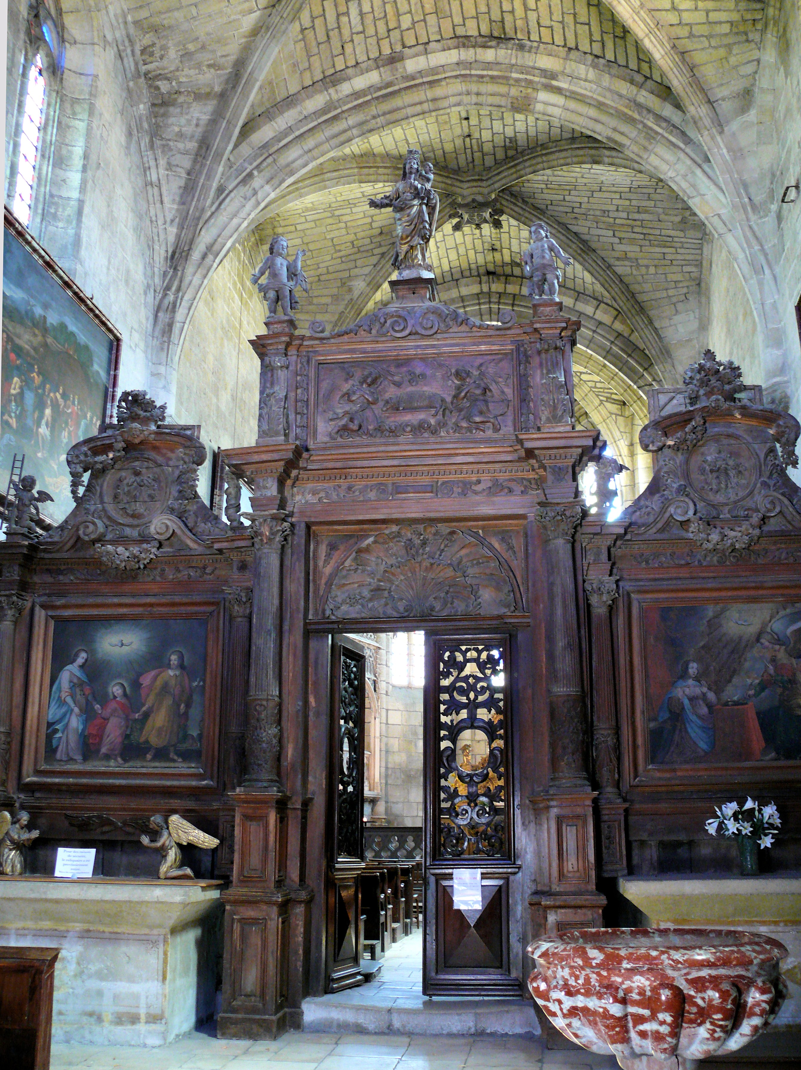 Villefranche-de-Rouergue - Chartreuse Saint-Sauveur - Église - Jubé séparant le chœur des moines du reste de la nef.